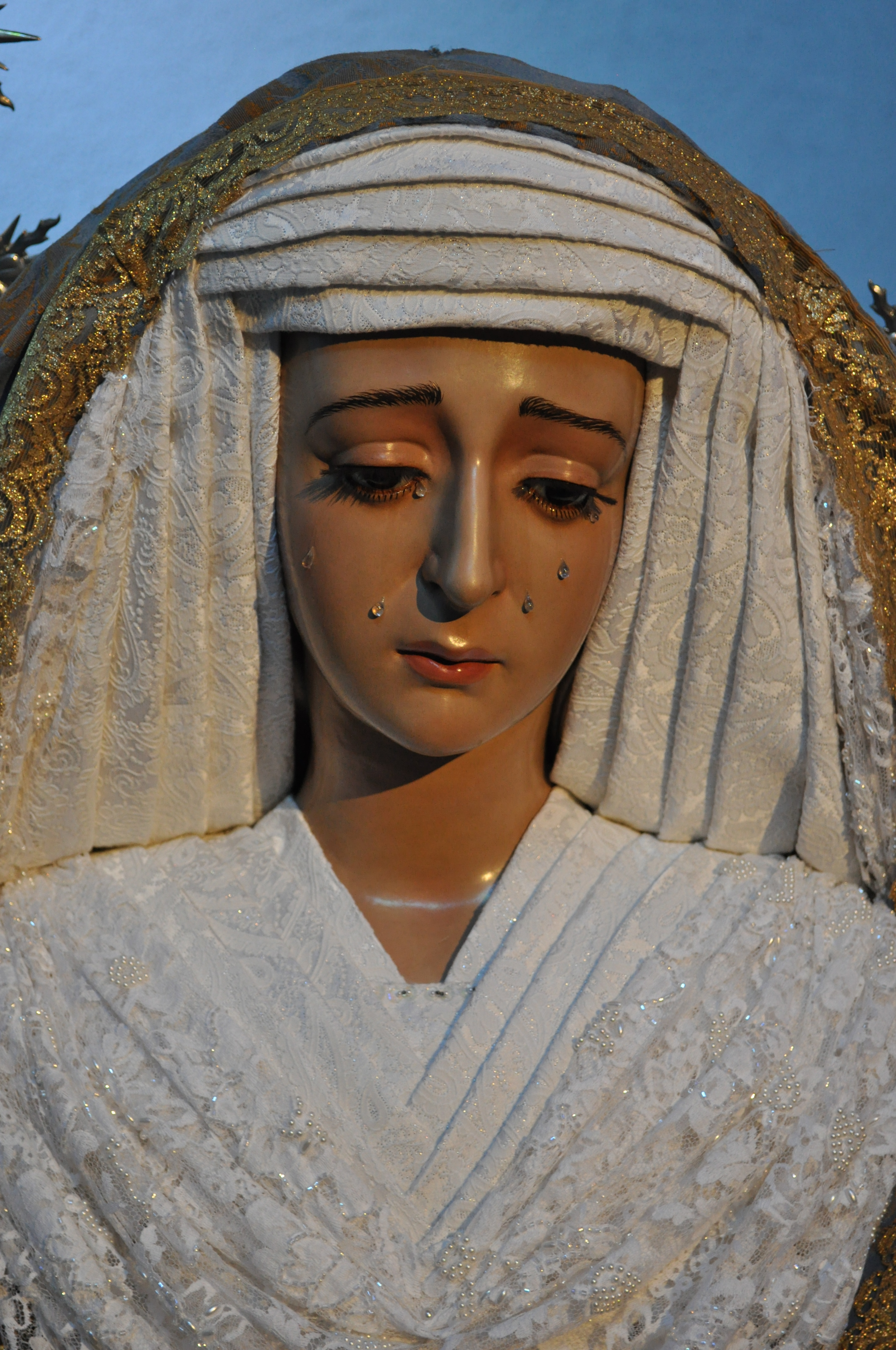 Bello rostro de Nuestra Señora de la Esperanza Ronda (Málaga)